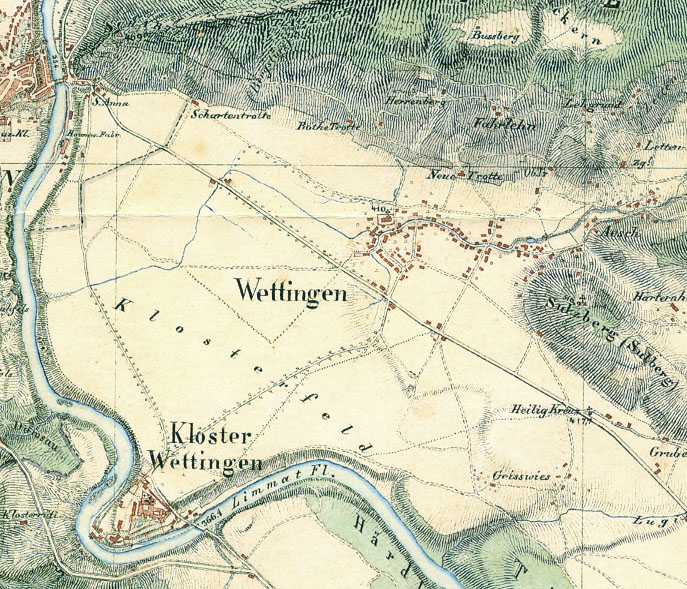 Wettingen auf der Michaeliskarte um 1840